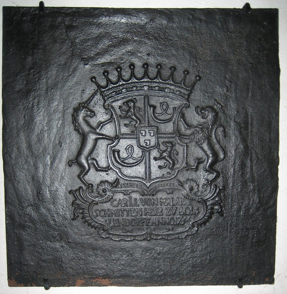 Eng Tak. Opschrëft: CARLL VON MALAISE / SCHMITTEN HERR ZU BOL- / LENDORFF ANNO 1734